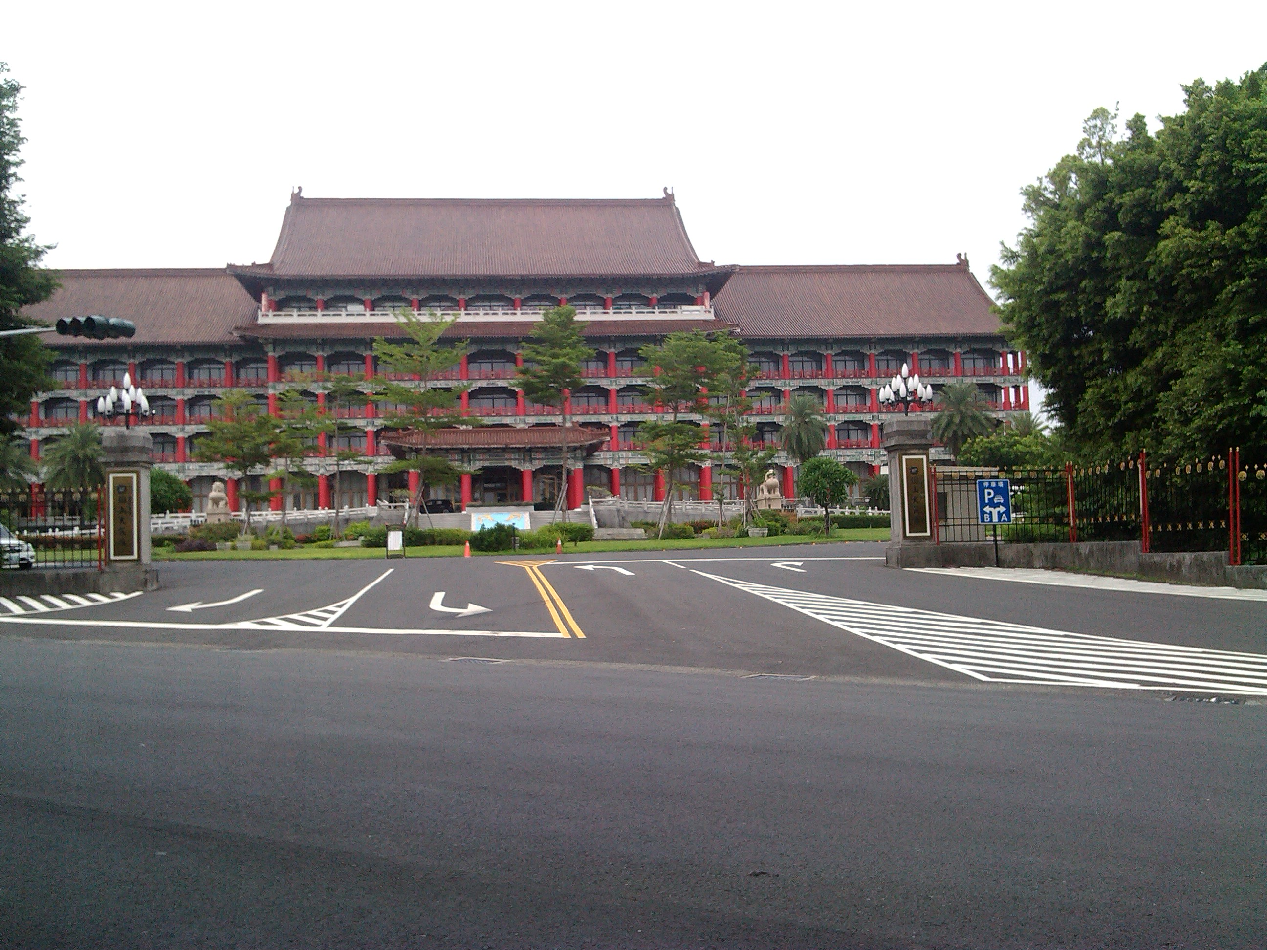 位於鳥松區圓山路 臨正修科大、澄清湖